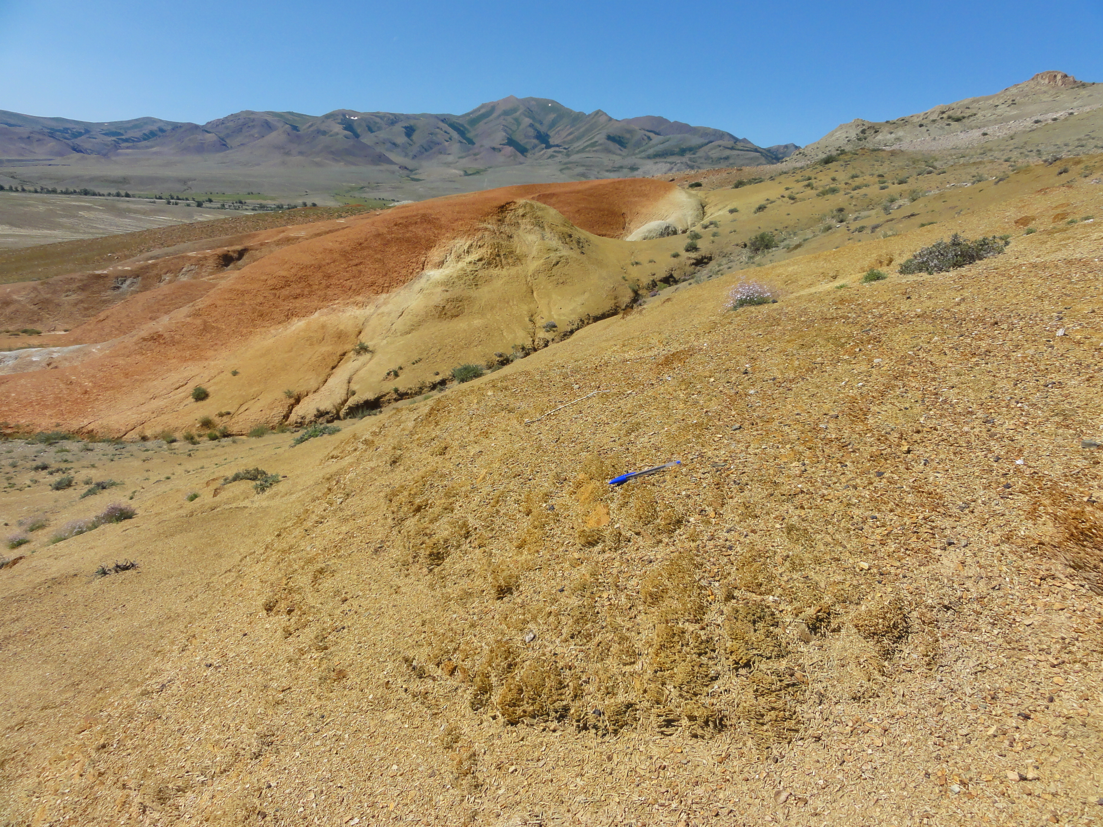 Кош-Агачский заказник, Кош-Агачский район Chuya Basin, Kosh-Agach region. This image is related to the protected area of Russia number 0410006